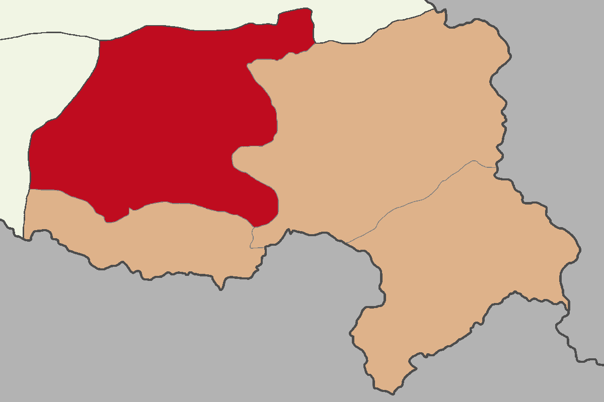 Hakkari Merkez ilçesinin konumu